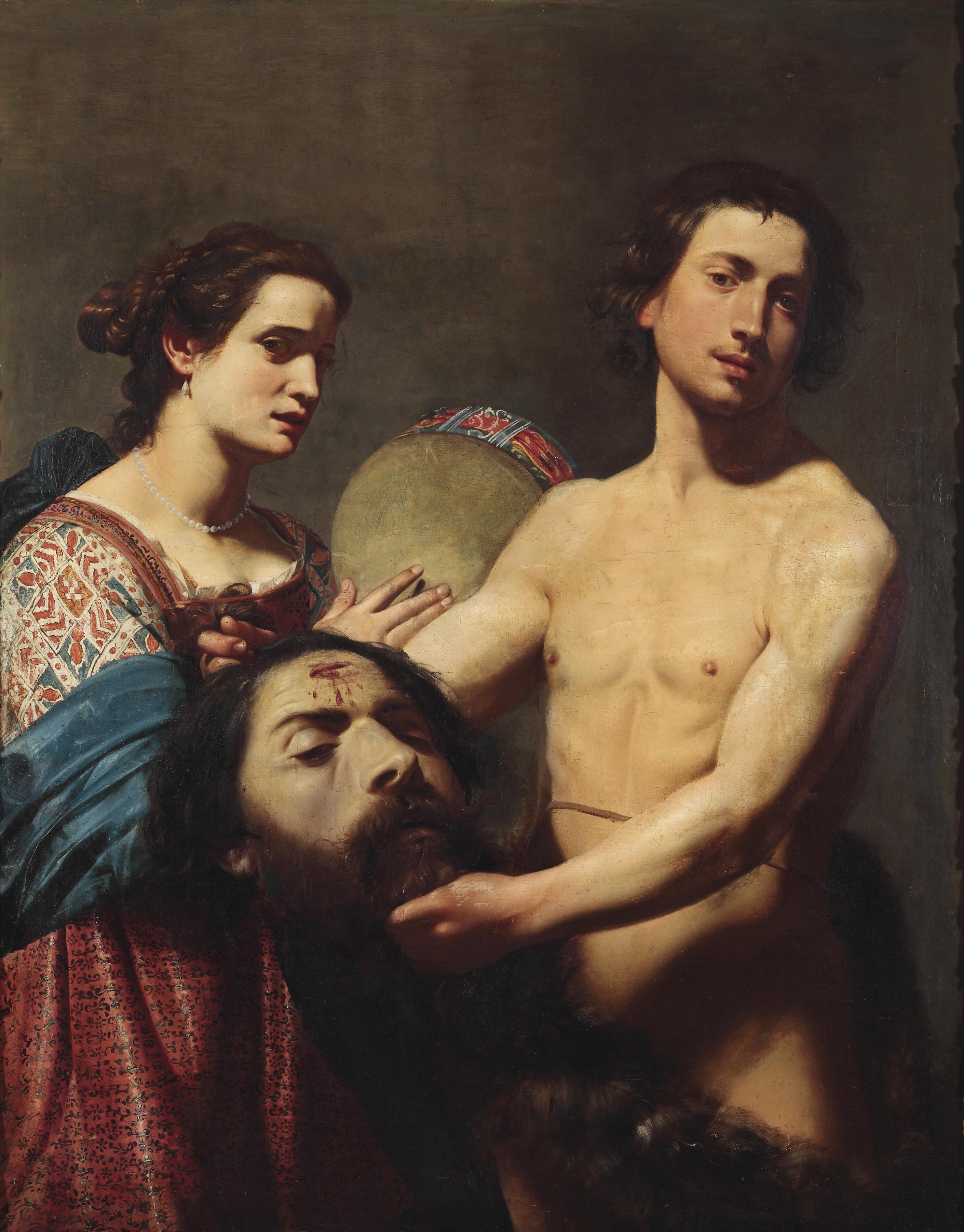 Davide con la testa di golia